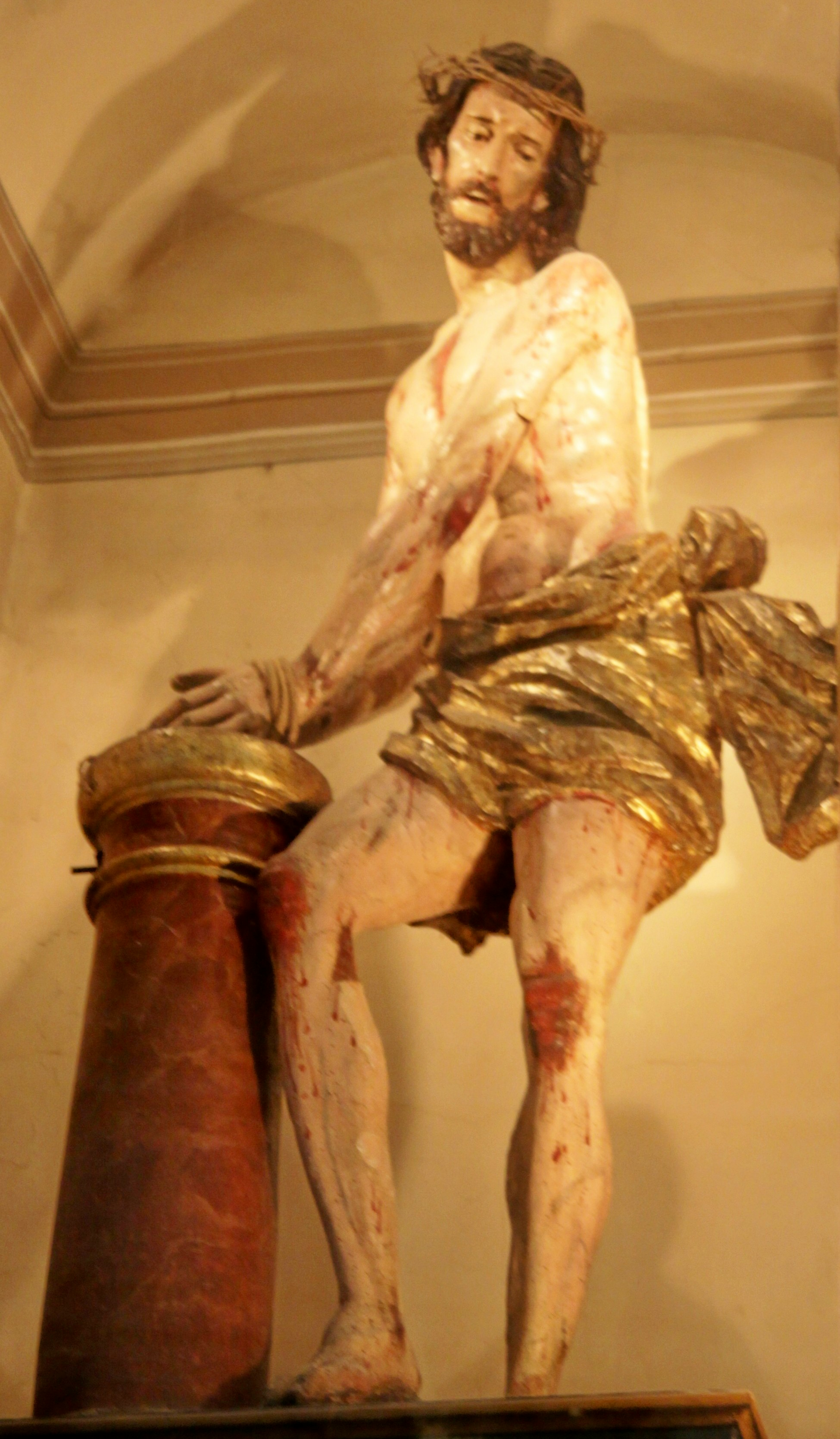 Militello in Val di Catania. "Cristo alla colonna" del frate Umile da Petralia (1630). Opera già presso la chiesa di S. Antonio abate e oggi presso Chiesa Santuario S. Maria della Stella.